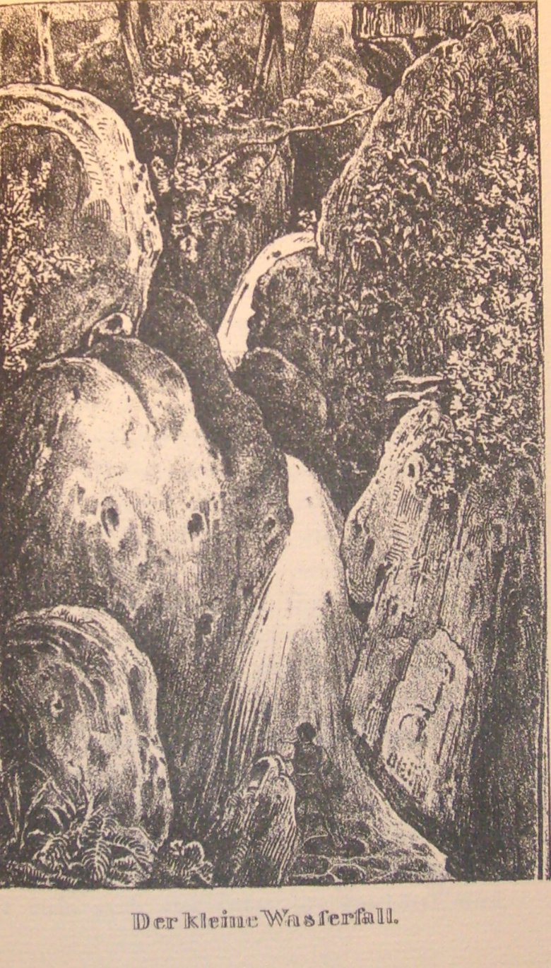 "Der kleine Wasserfall" im Neandertal 1835 - Lithografie offenbar nach einer unbekannten Vorlage.